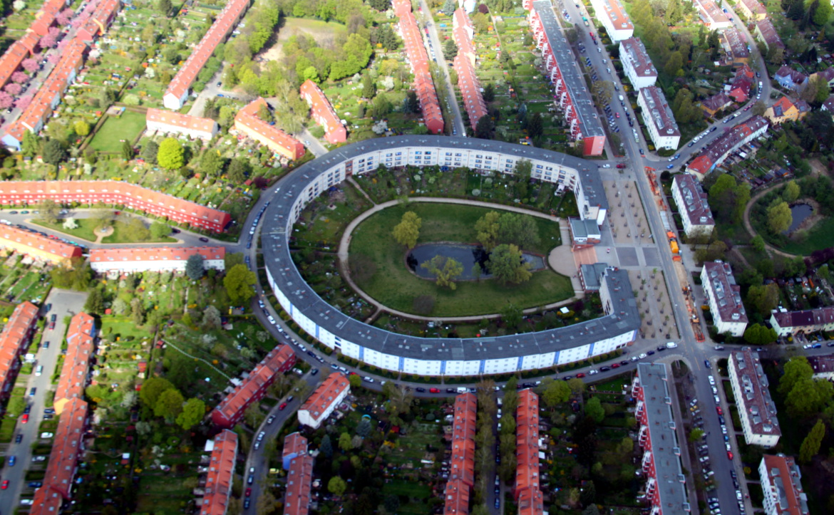 Das Hufeisen, welches der Hufeisensiedlung den Namen gab.